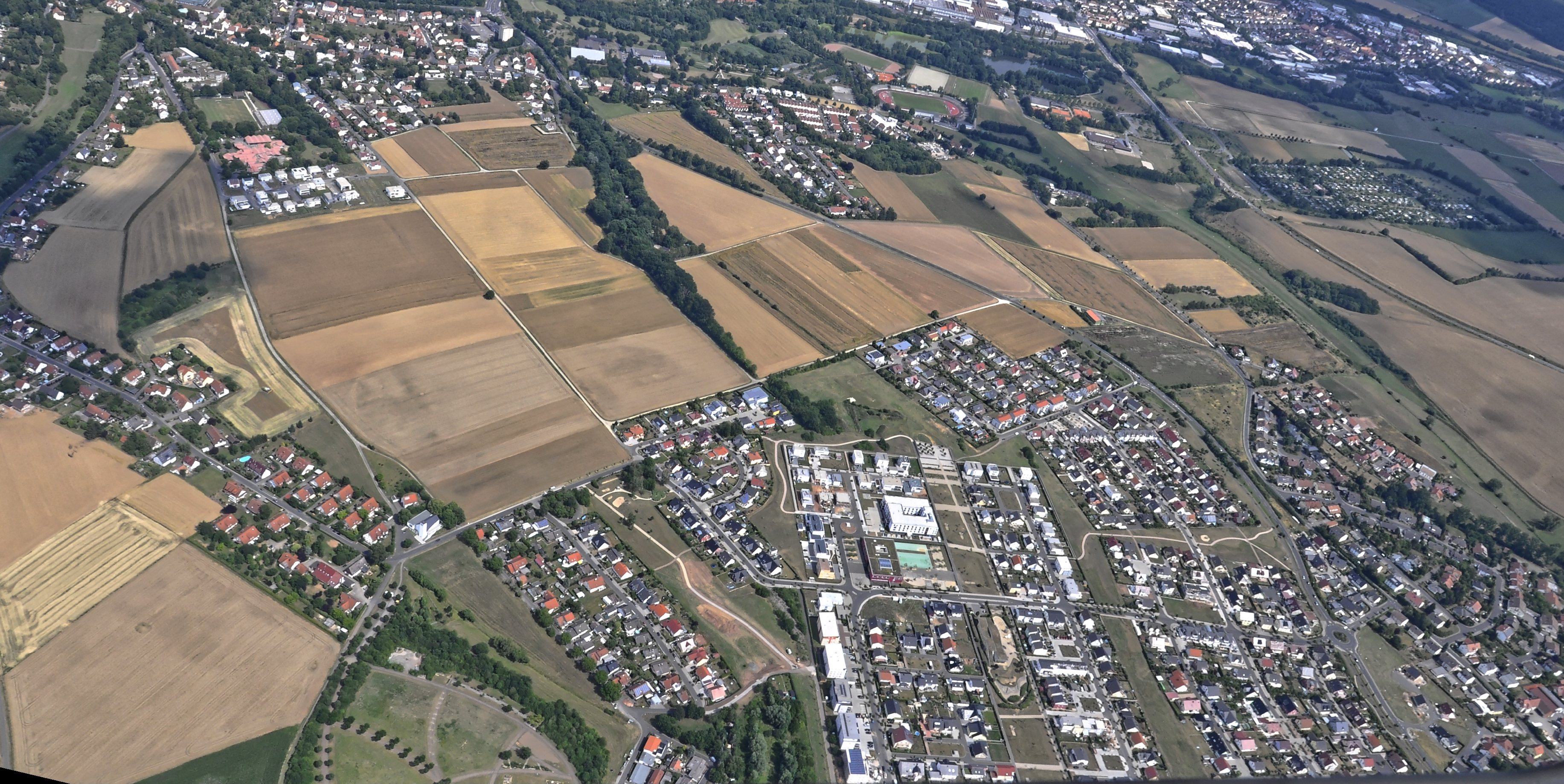 Bilder vom Flug Nordholz-Hammelburg 2015: Der Stadtbezirk Fulda-Galerie im Vordergrund.